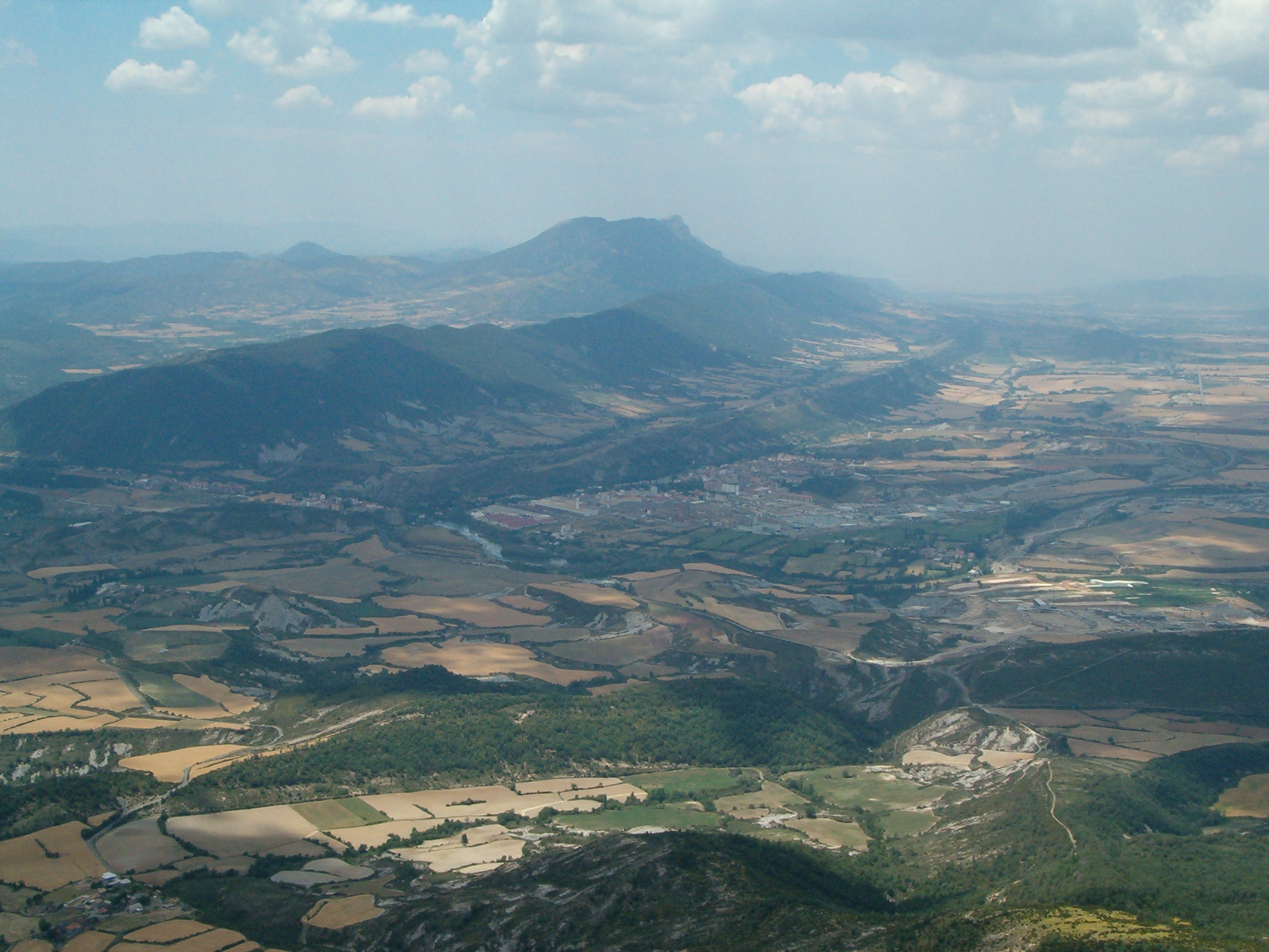 Vista de Sabiñánigo desde Santa Orosia con el Monte Oroel al fondo